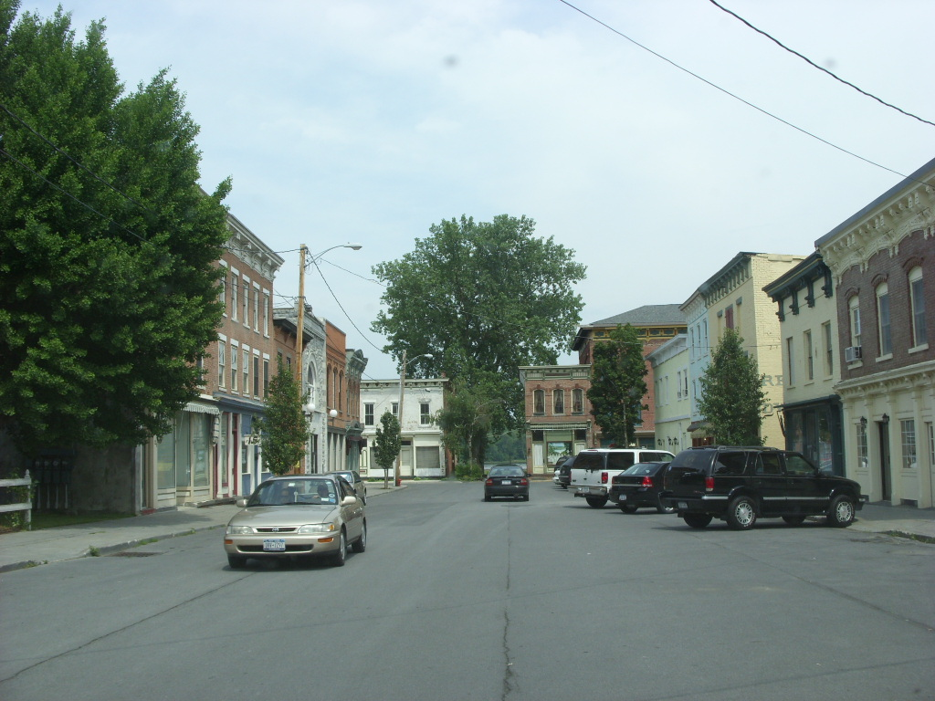 SN858728